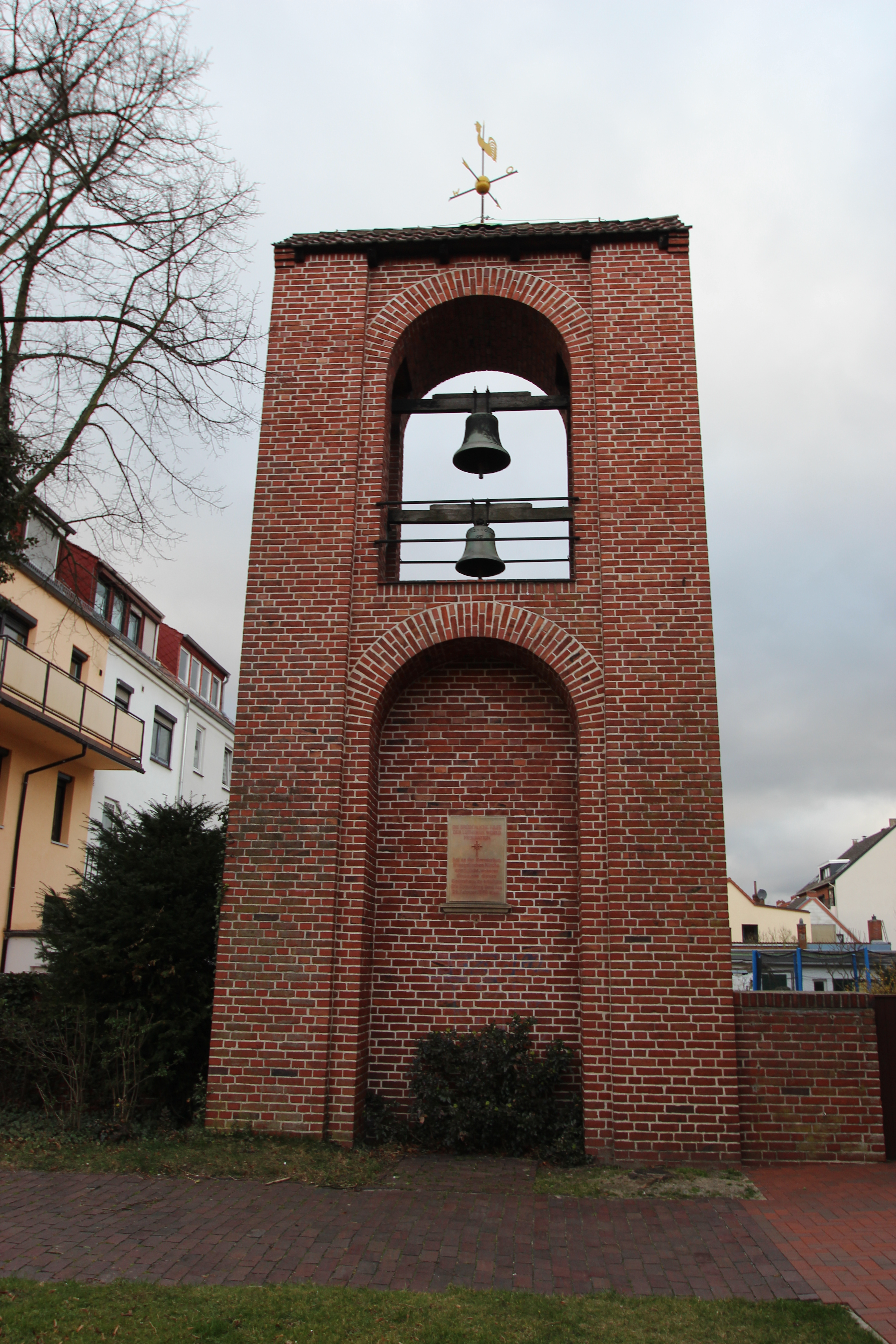 Glockenturm der St. Andreas Kirche in Bremen, Danziger Straße 20. Das abgebildete Objekt ist ein geschütztes Kulturdenkmal in der Freien Hansestadt Bremen, mit der Nr. 0291 beim Landesamt für Denkmalpflege registriert.